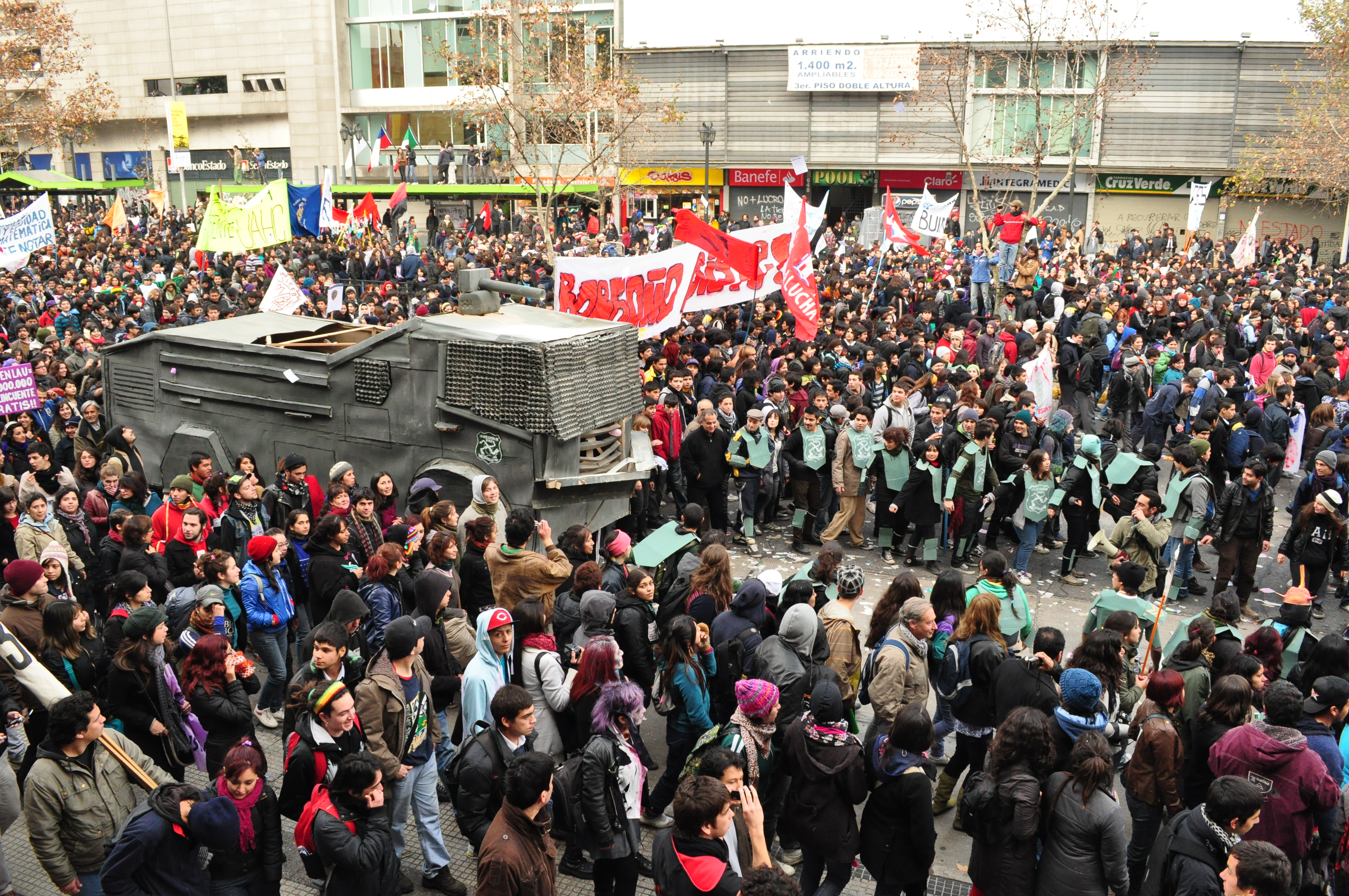 Guanaco hecho por un grupo de estudiantes. Marcha del 30 - 06 - 2011